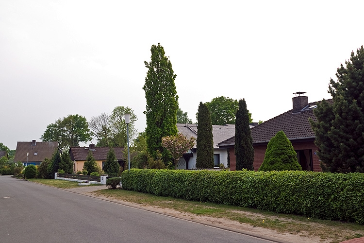 In Saaße entstand seit den 1950er-Jahren aufgrund der Nähe zur Kreisstadt Lüchow ein Neubaugebiet nördlich des alten Rundlings.